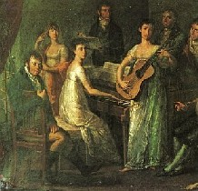 Therese Malfatti von Rohrenbach zu Dezza (1792-1851), eine Nichte des Arztes Johann Malfatti.